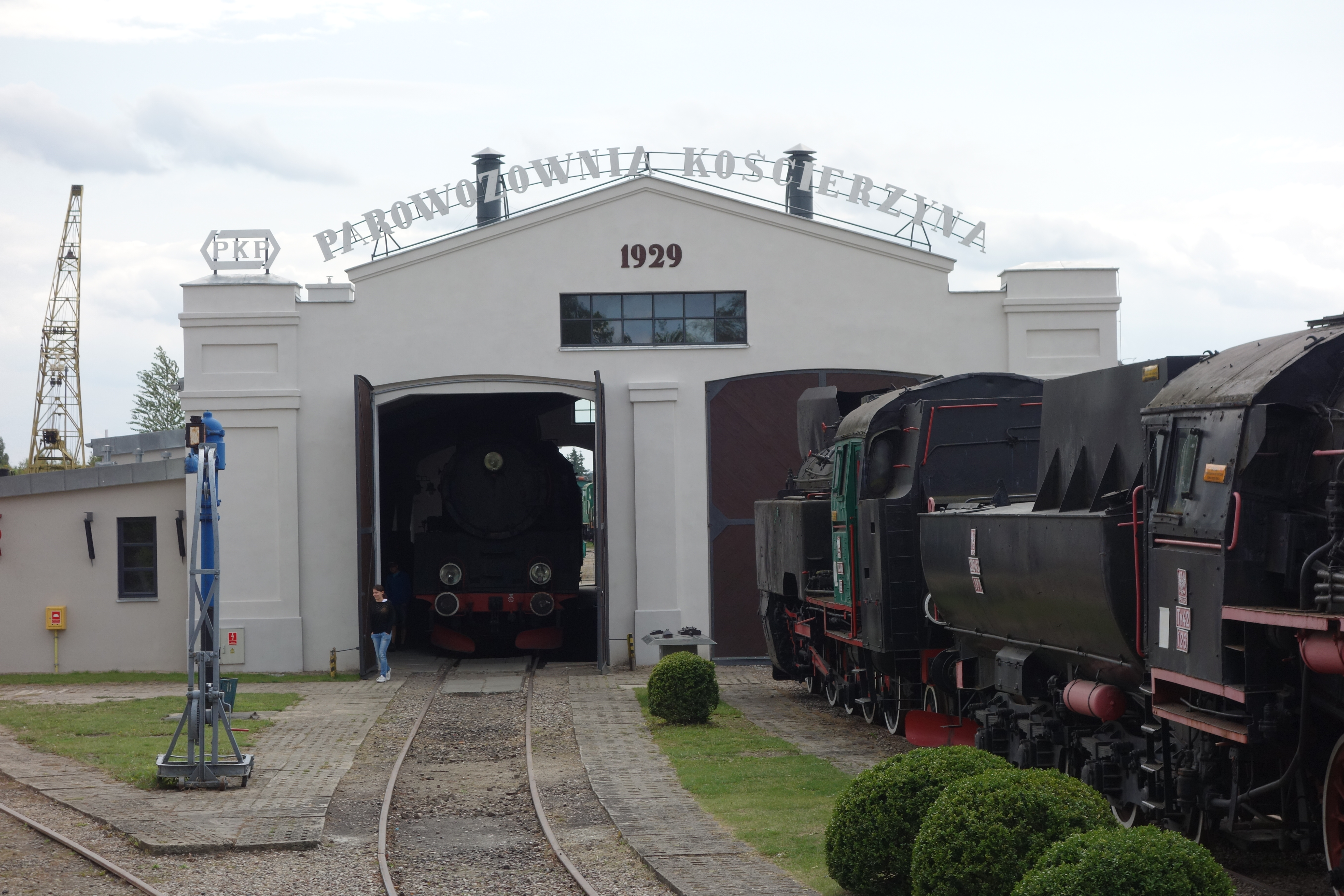 Kościerzyna - Muzeum Kolejnictwa - hala parowozowni , You can see all photographs in category Wikiekspedycja kolejowa 2014.